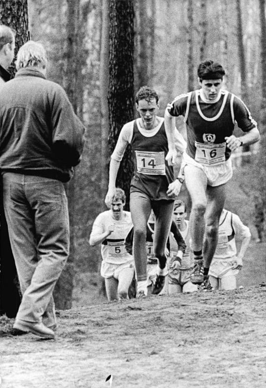 Rainer Wachenbrunner ADN-ZB Pätzold-27.3.88 Bez. Schwerin: 25. DDR-Cross-Meisterschaften in Bad Wilsnack- Beim 12-km-Lauf der Männer siegte Rainer Wachenbrunner (SC Dynamo Berlin, vorn r.) in 36:08,3 min.